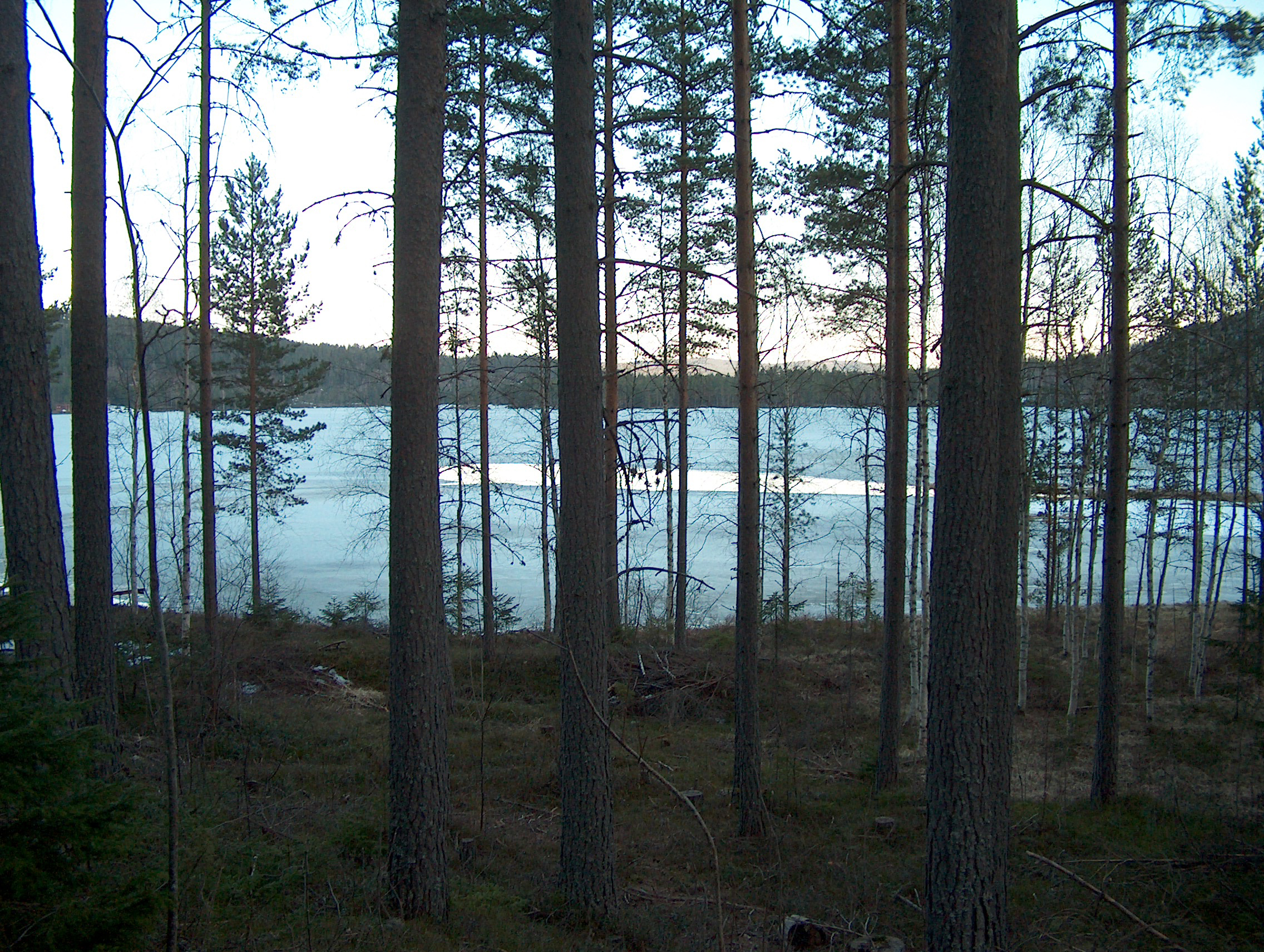 Bergsjø (nordenden)